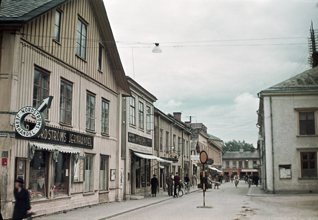 People in Drottninggatan (Queen Street) in Filipstad. Människor på Drottninggatan i Filipstad. Parish (socken): Filipstad Province (landskap): Värmland Municipality (kommun): Filipstad County (län): Värmland Photograph by: Fredrik Bruno Date: 1943 Format: Colour slide Persistent URL: Read more about the photo database (in english)